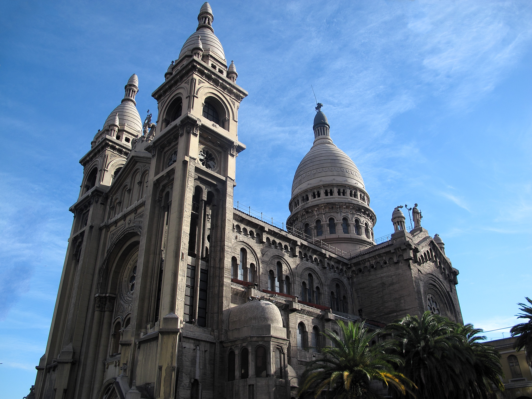 Basílica de Los Sacramentinos This is a photo of a national monument in Chile: 880